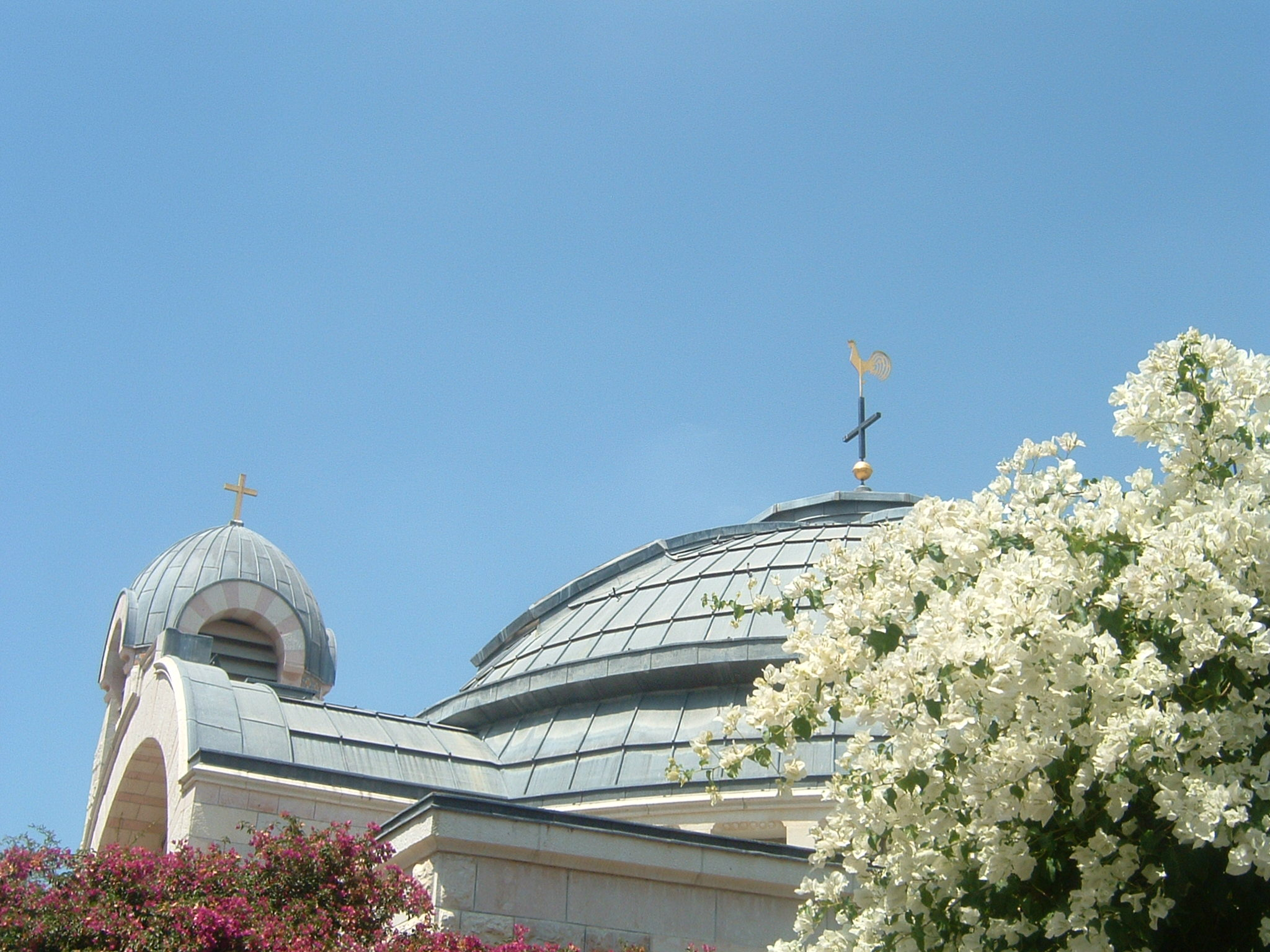 Il galletto sul tetto della Chiesa San Pietro in Gallicantu a Gerusalemme Foto scatta da me l'11 giugno 2008